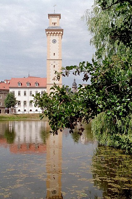 Altenburg/Thür. Kunstturm Foto: Olaf Bolz, Cottbus 2000